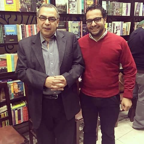 الكاتب أمير عاطف في احتفالية بالدكتور أحمد خالد توفيق